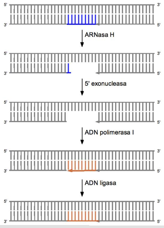 unión de los fragmentso de okazaki durante la terminación de la replicación de ADN